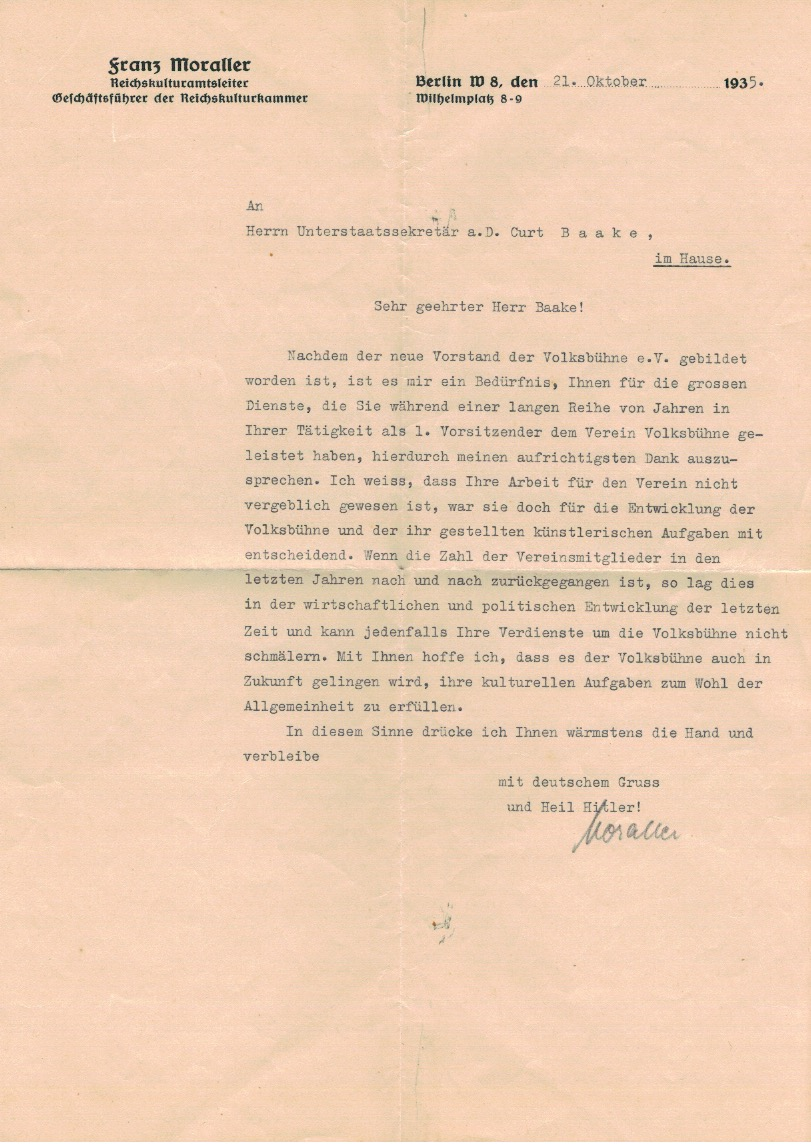 Dankesschreiben von Reichskulturamtsleiter Franz Moraller an Unterstaatssekretär a.D. Curt Baake anlässlich dessen Rückzug aus dem Vorstand der Volksbühne e.V., Oktober 1935.